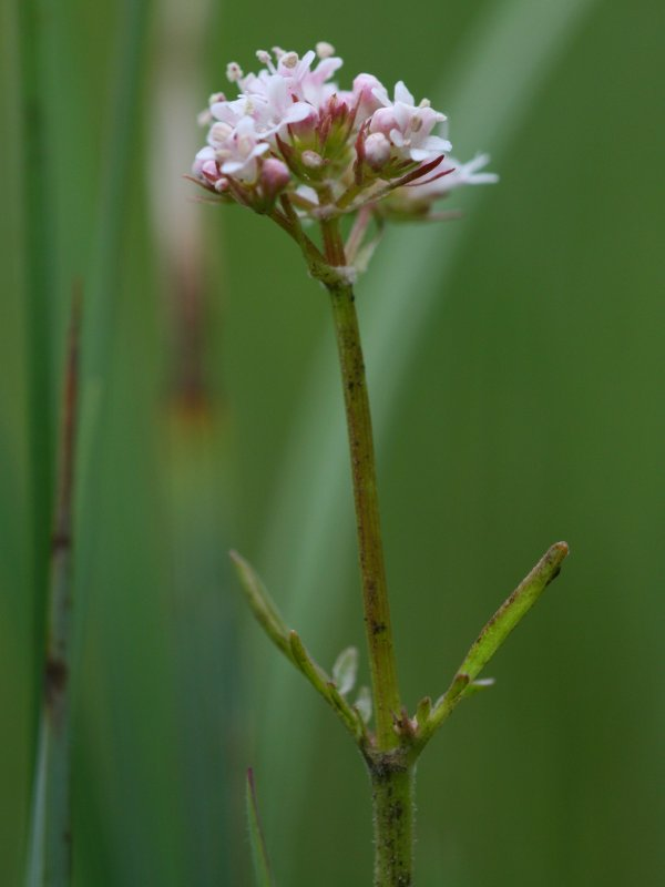 Kleiner Baldrian (Valeriana dioica), männliche Pflanze, Habitus